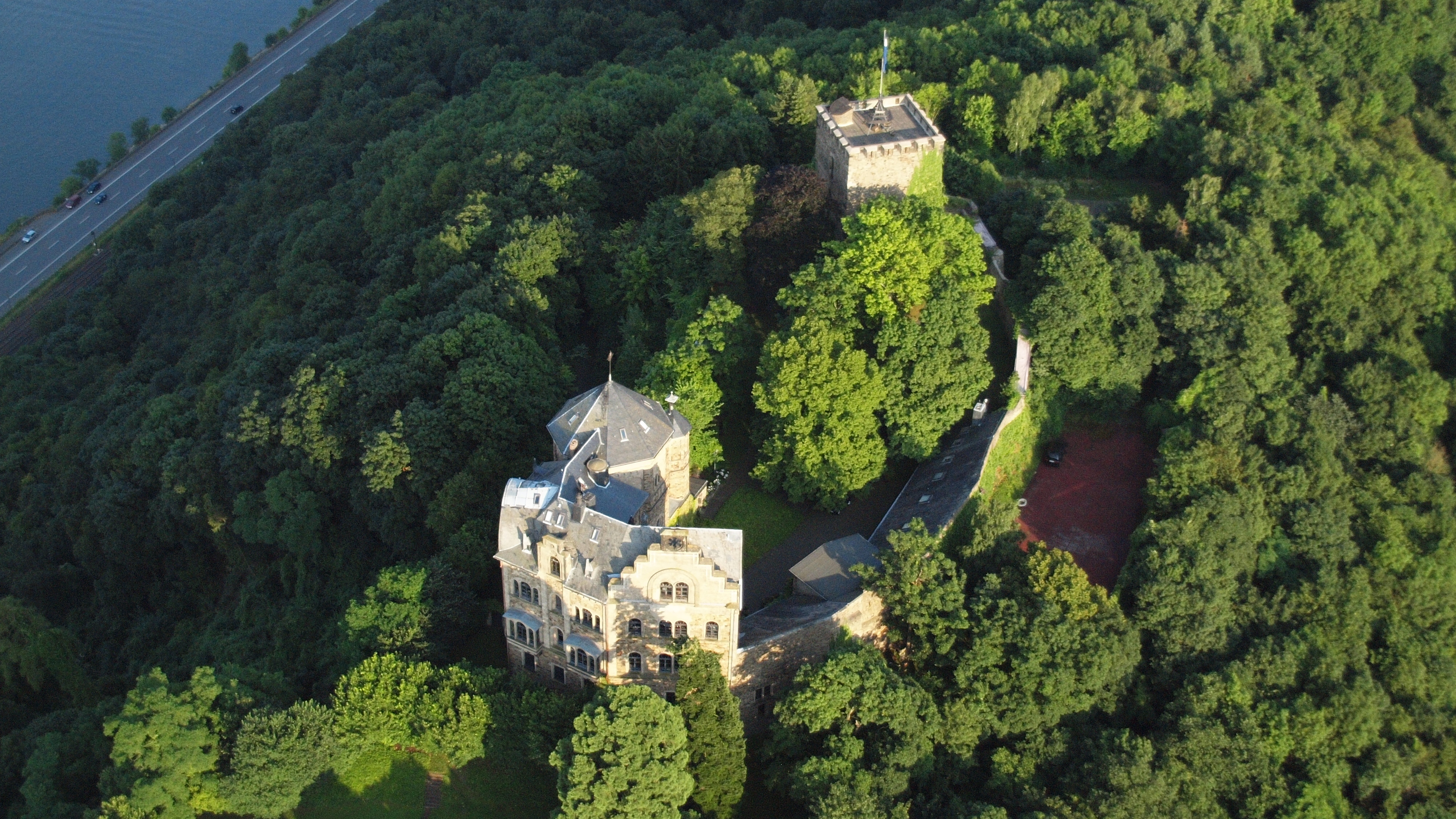 Burg Rheineck: Luftaufnahme aus nordwesticher Richtung